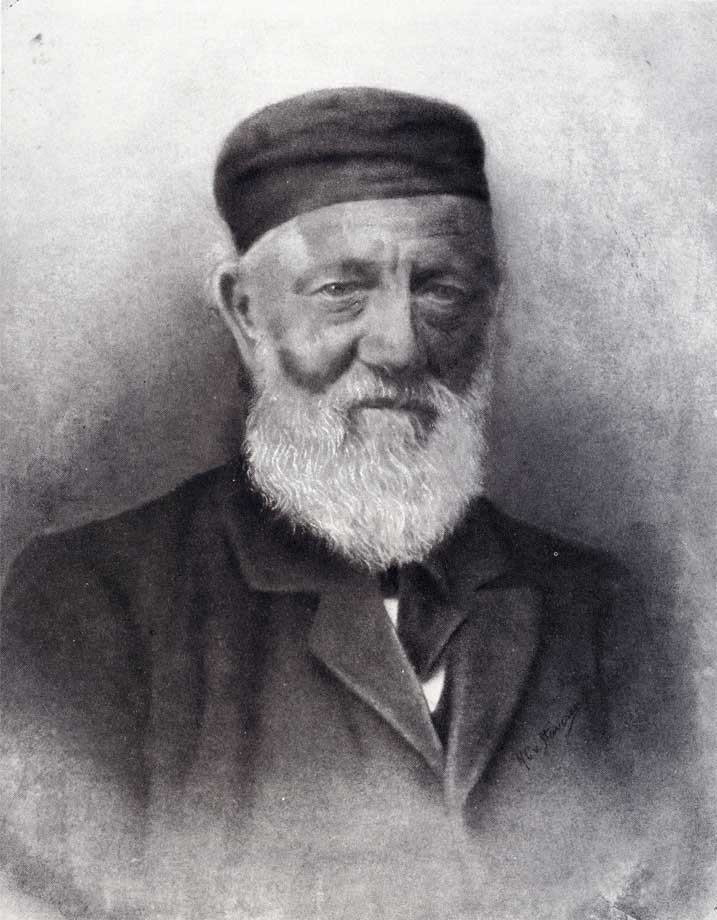 Portret van Johannes Jacobus Bertelman